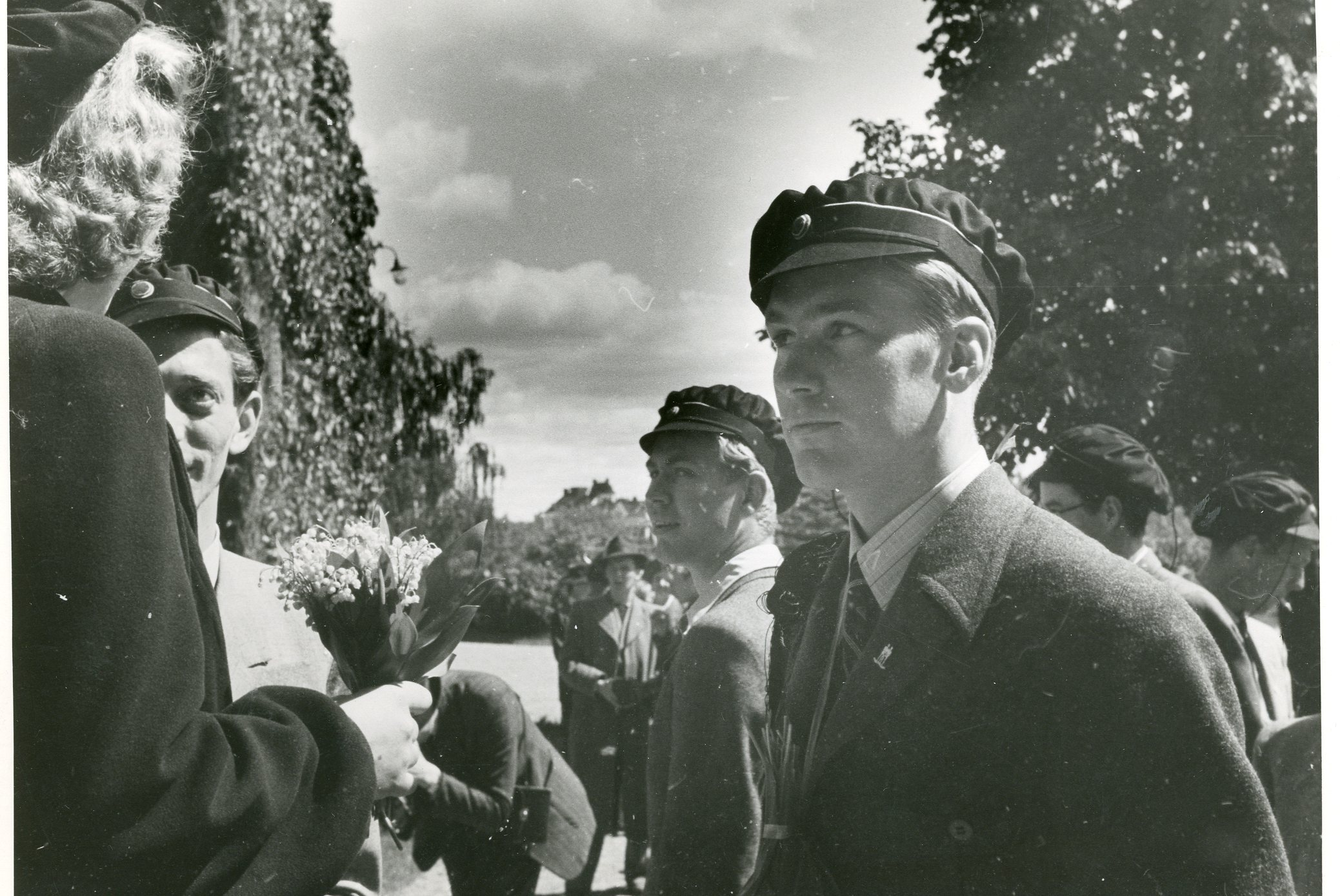 Fra immatrikuleringen av de norske studenter i Uppsala våren 1942. En gruppe studenter i samtale. RA/Pa-1209/Uc/67/3/S5374